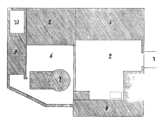 Plán hradu Svádov z roku 1720